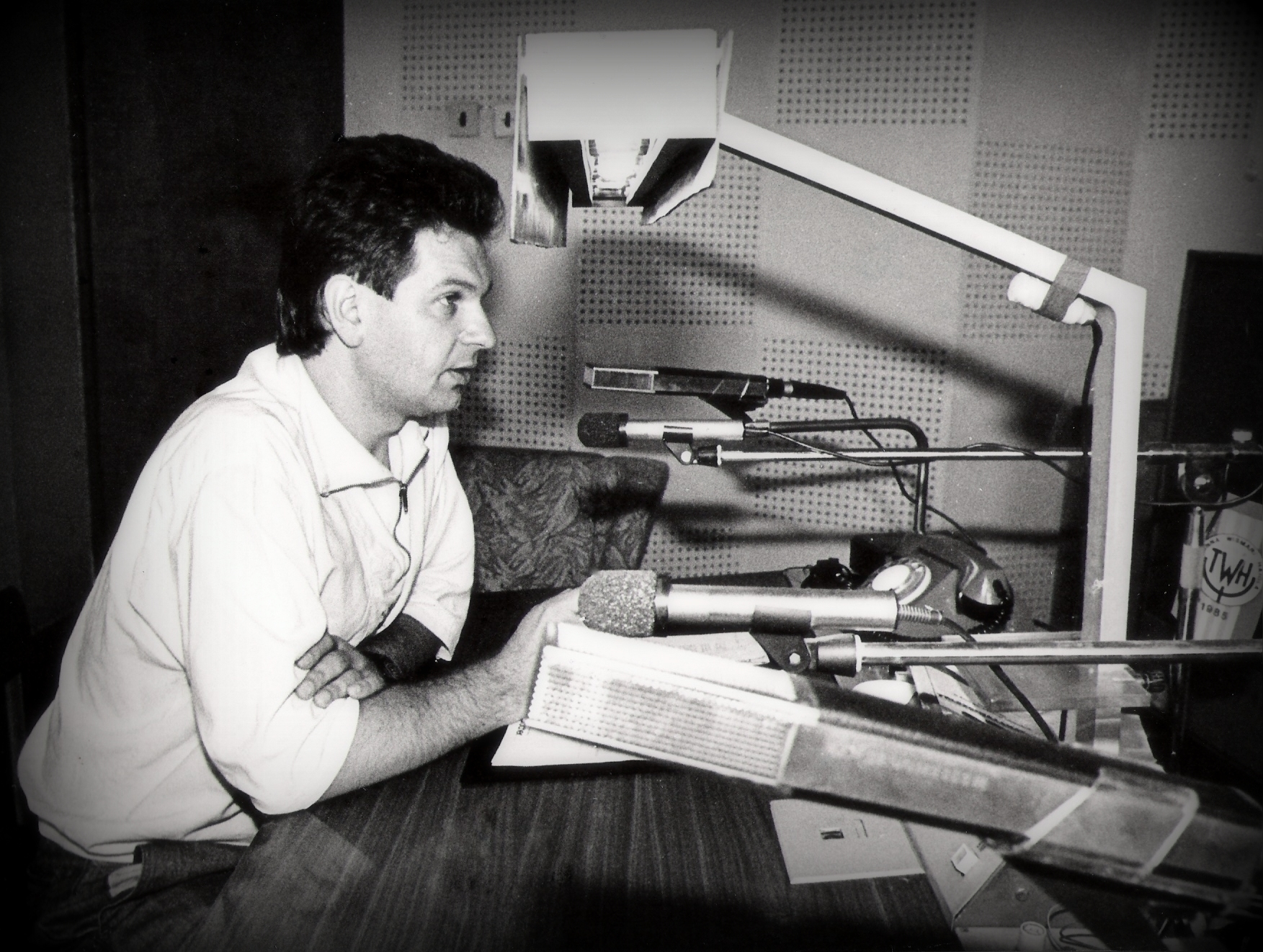 saatejuht Ain Saarna Eesti Raadio stuudios